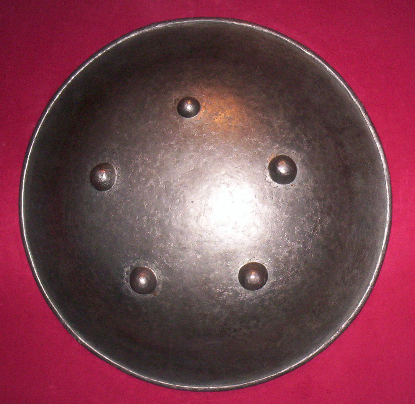 16. vagy 17. századi kerek pajzs. d= 620 mm ; h= 120 mm ; m= 3,7 kg. A Csíki Székely Múzeum tulajdona. – photo taken by uploader User:Csanády in 2006.